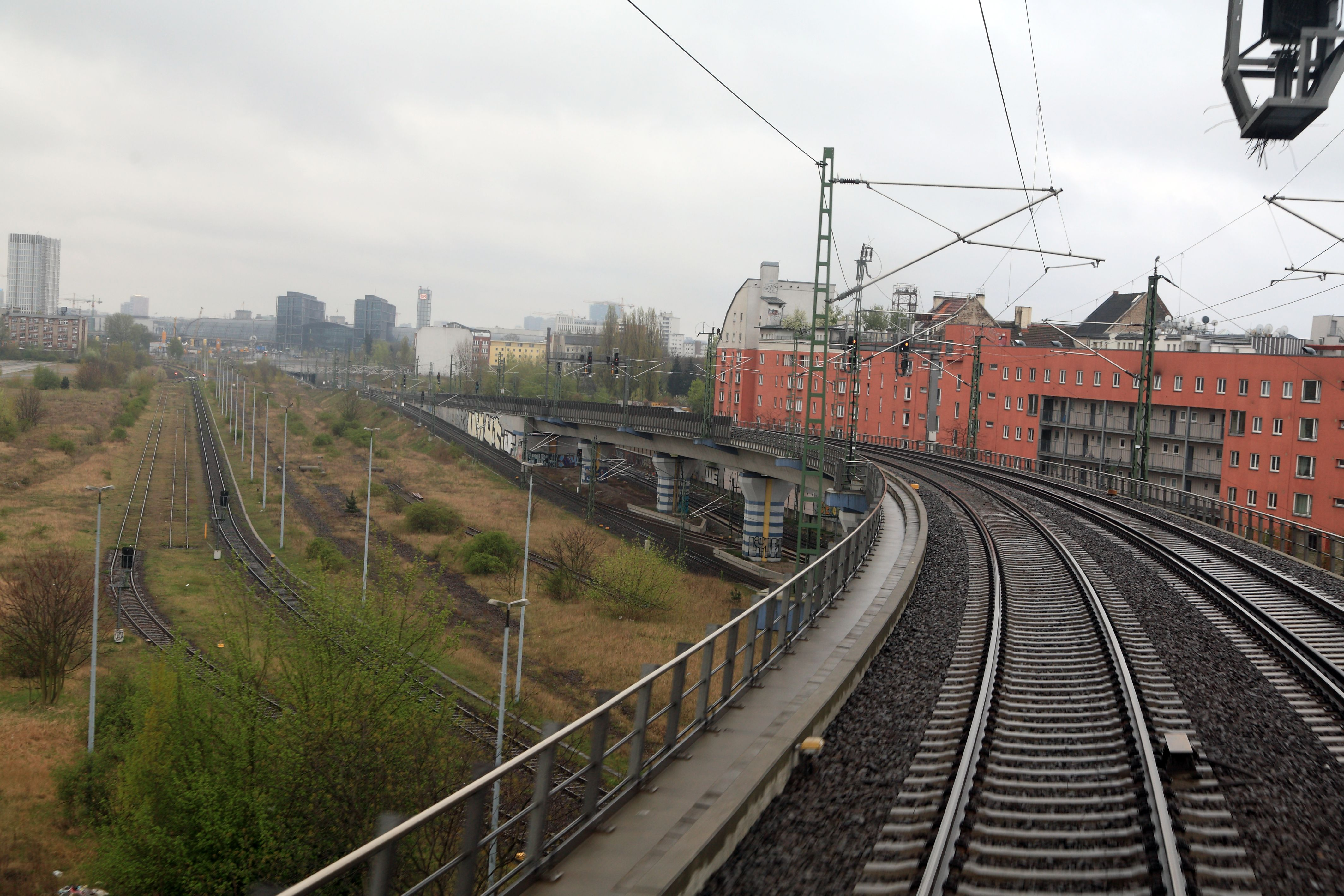 Bogen aus Richtung Bln-Wedding, links der Bahnhof Bln Hamburger und Lehrter Gbf. Die Tunnelrampe für den zweiten S-Bahn-Nord-Süd-Tunnel wird links von den Ferngleisen gebaut. Die Einfahrsignale des Bahnhofs Berlin Hbf 51C und 51D aus Richtung Gesundbrunnen sind die am Ende der Brücke. Der Gleismagnet im Vordergrund ist der 500Hz-Magnet des linken Einfahrsignals 51D.